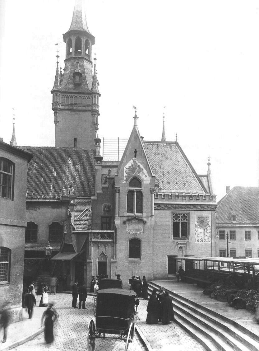 Das Kleine Rathaus in München diente um 1900 als Standesamt